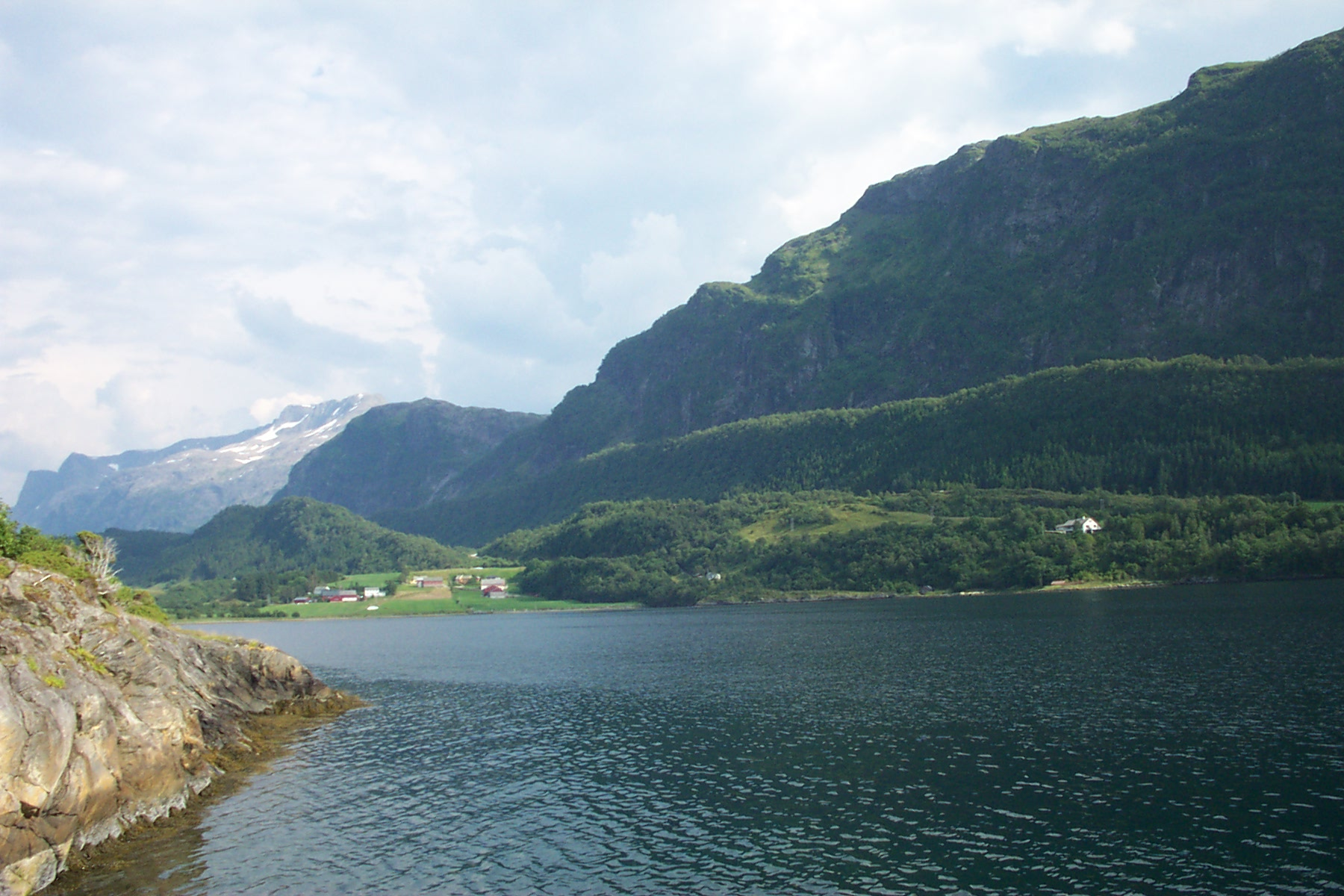 The village Gjelsvik by Førdefjorden in Askvoll muncipality in Sogn og Fjordane.